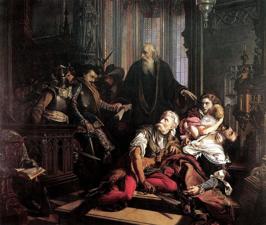 Madarász Viktor: Kuruc és labanc olaj, vászon (Herendi Porcelánmúzeum tulajdona) A kép politikai aktualitása nagyon is világos volt, egy testvérpárt állított a középpontba. Egyikük felesége karjában haldoklik, a másik testvér császári egyenruhában, kezében elfogató paranccsal lép be éppen. A cenzúra miatt "Életrajz Erdély múltjából" cím került az 1855-ös kiállításon a kép alá.